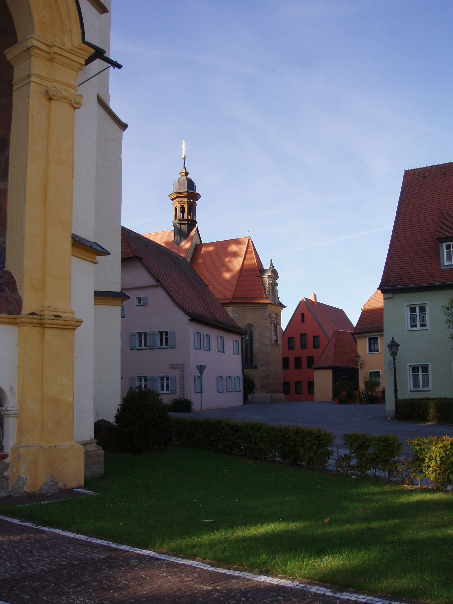 Liebfrauenkirche Herrieden